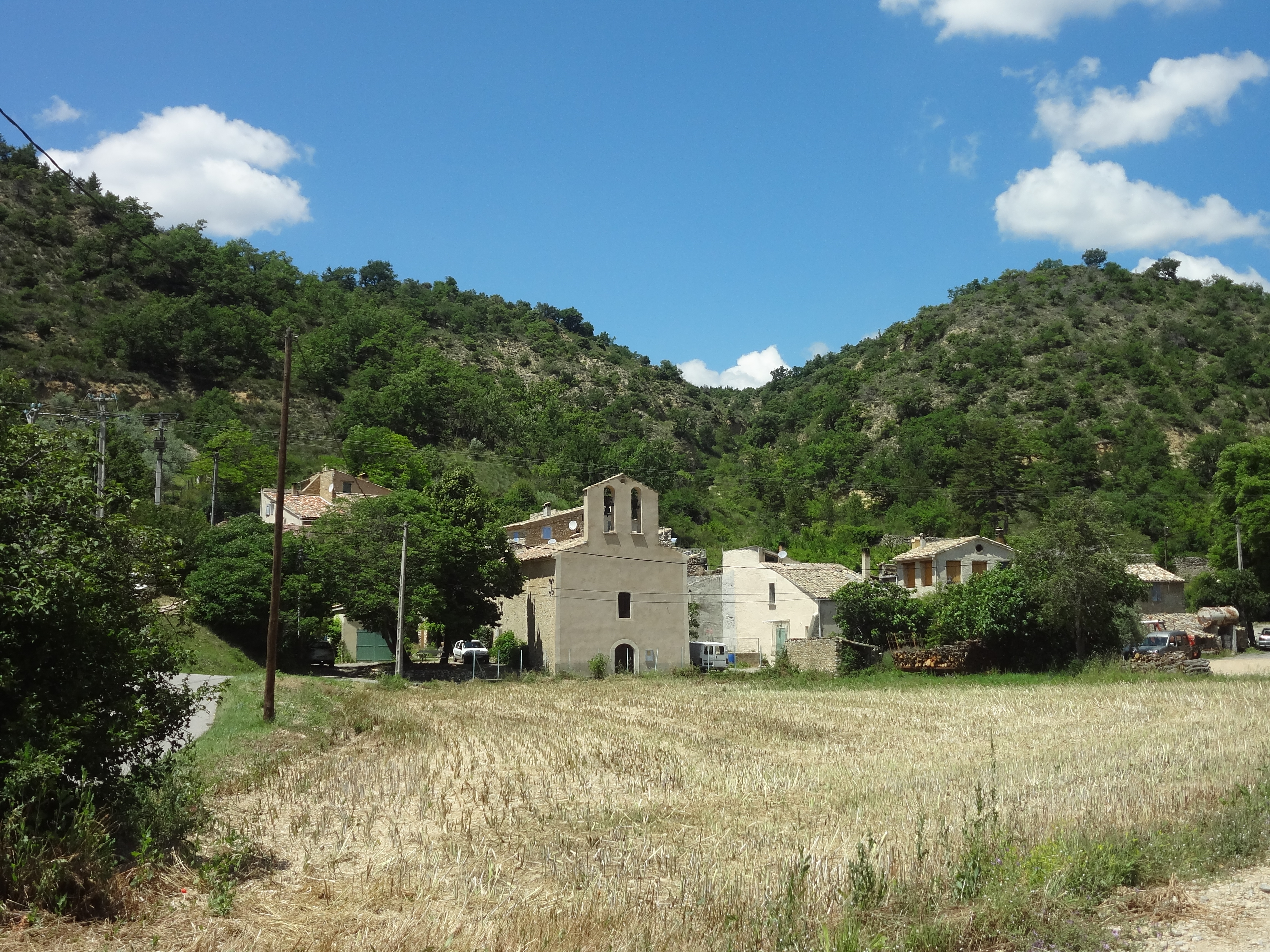 village de Saint-Jeannet